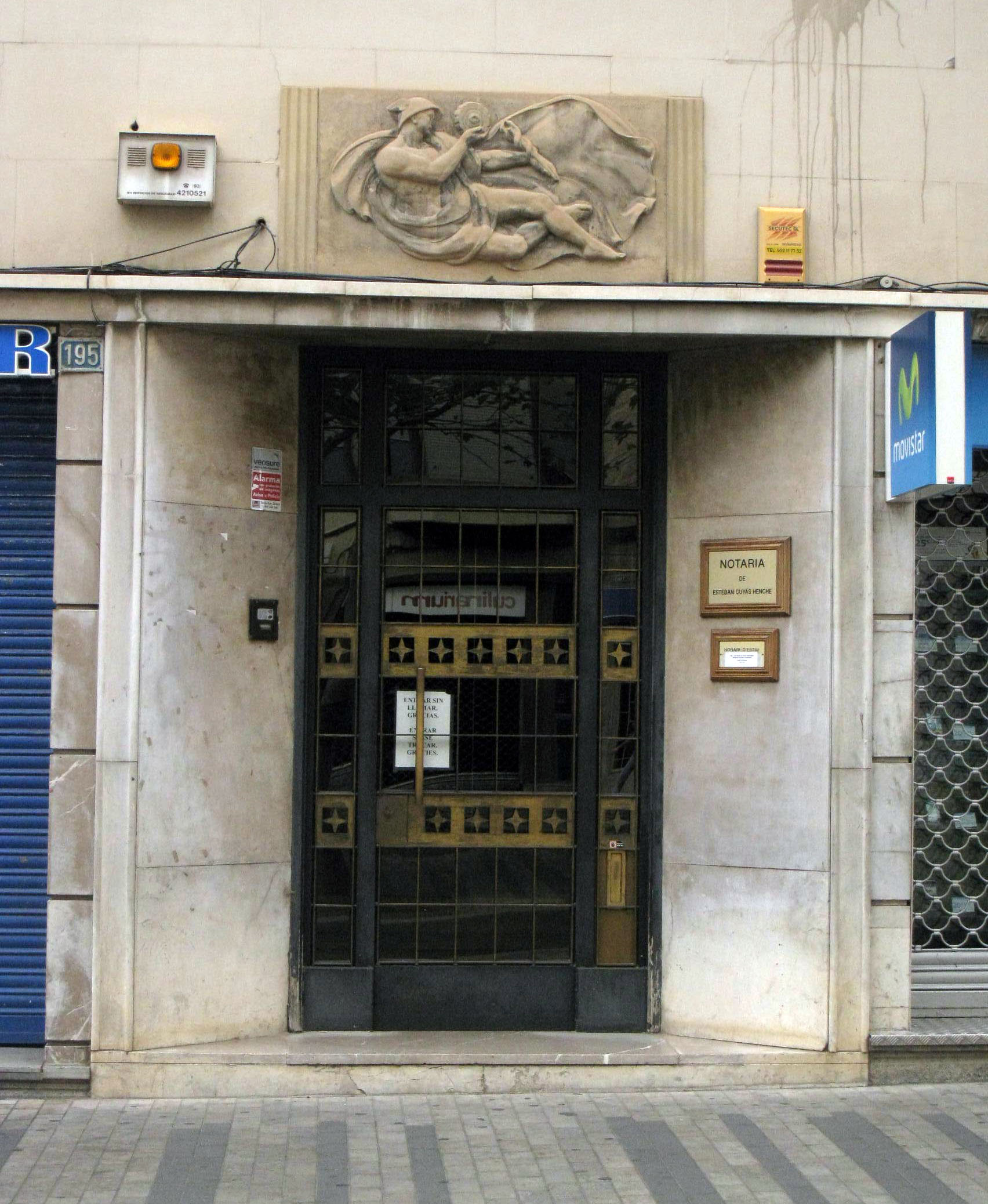 Casa de Maria Viñas i Oliver, a la Rambla d'Ègara núm. 197 (Terrassa). Edifici racionalista d'Ignasi Escudé del 1941. Vista de la porta i el plafó escultòric amb una al·legoria de Mercuri.